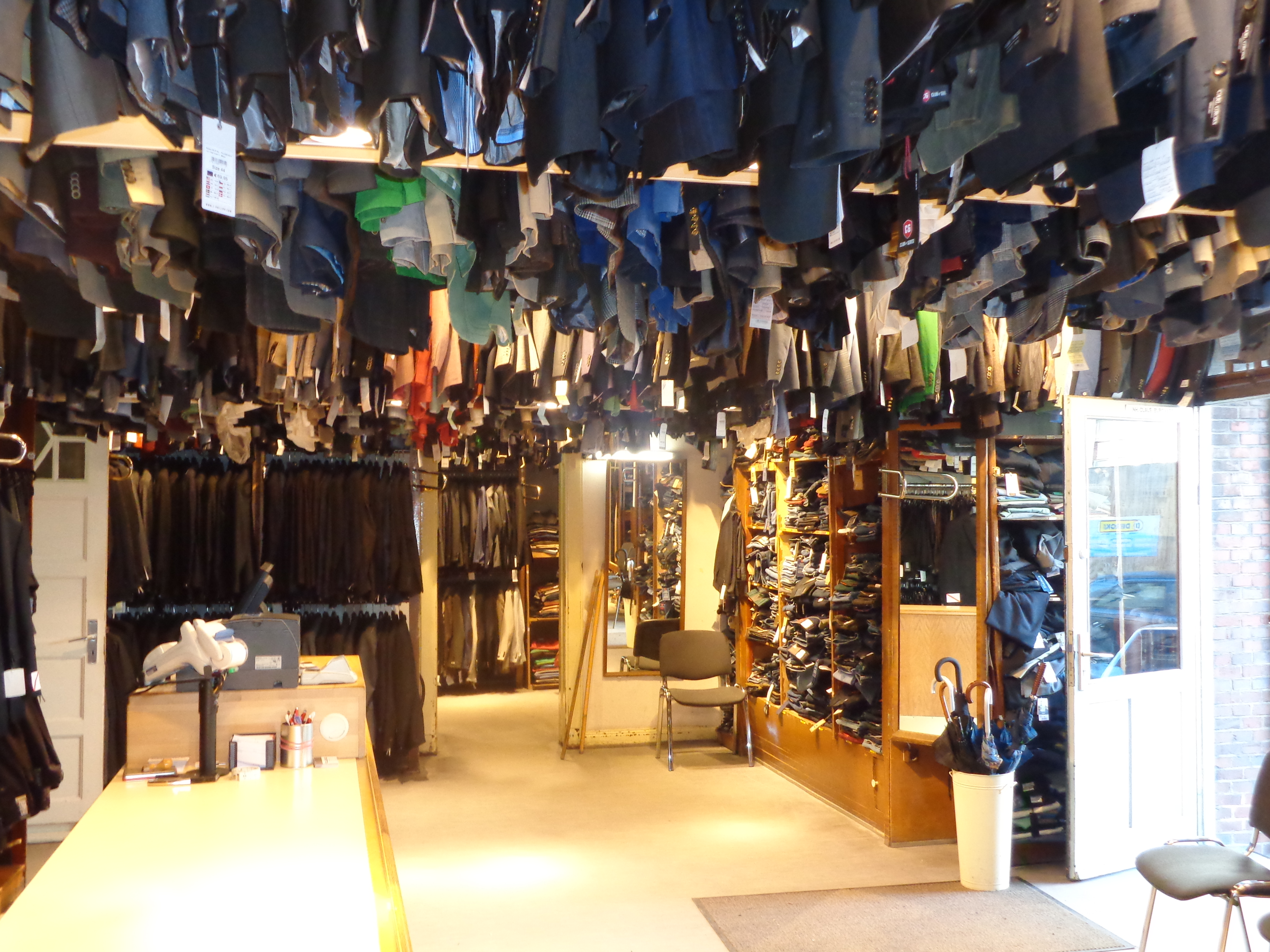 Verkaufsraum eines klassischen Herrenausstatters in Hamburg